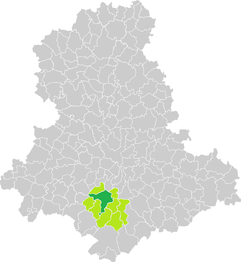 Carte de situation de la commune de Nexon (en vert foncé) dans le votre Canton (en vert clair) sur une carte des communes de la Haute-Vienne